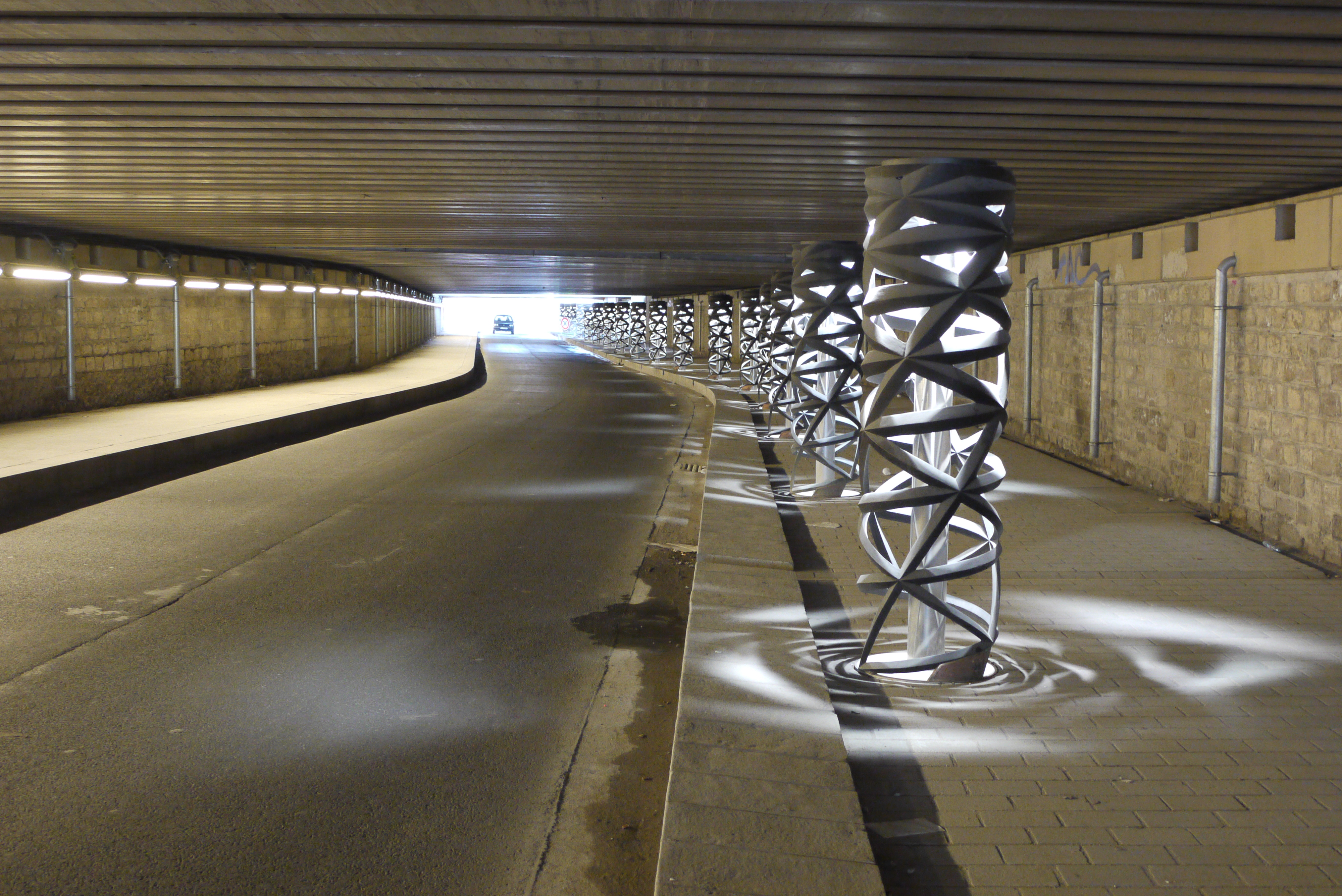 état actuel de la rue Watt, Paris